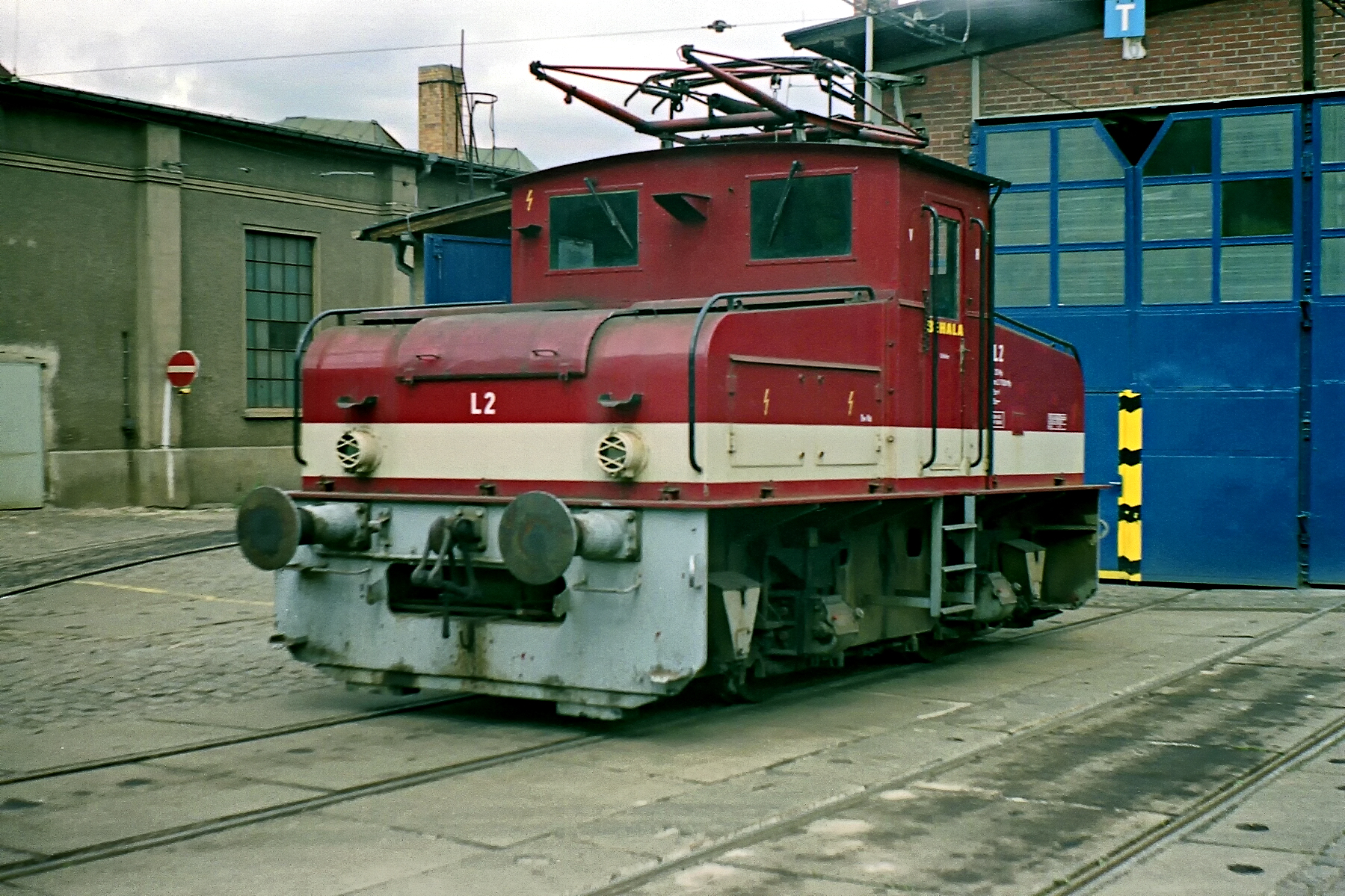 El-Lokomotive L 2 der BEHALA auf dem Betriebshof Nalepastraße der BVG 03.05.92